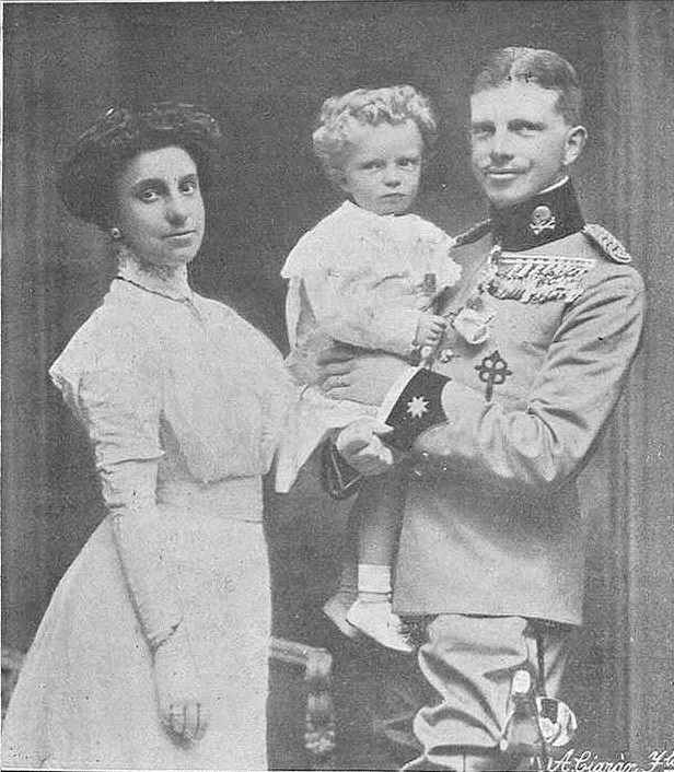 María Teresa de Borbón y Habsburgo-Lorena (izquierda) y Fernando de Baviera con su hijo Luis Alfonso de Baviera y Borbón.